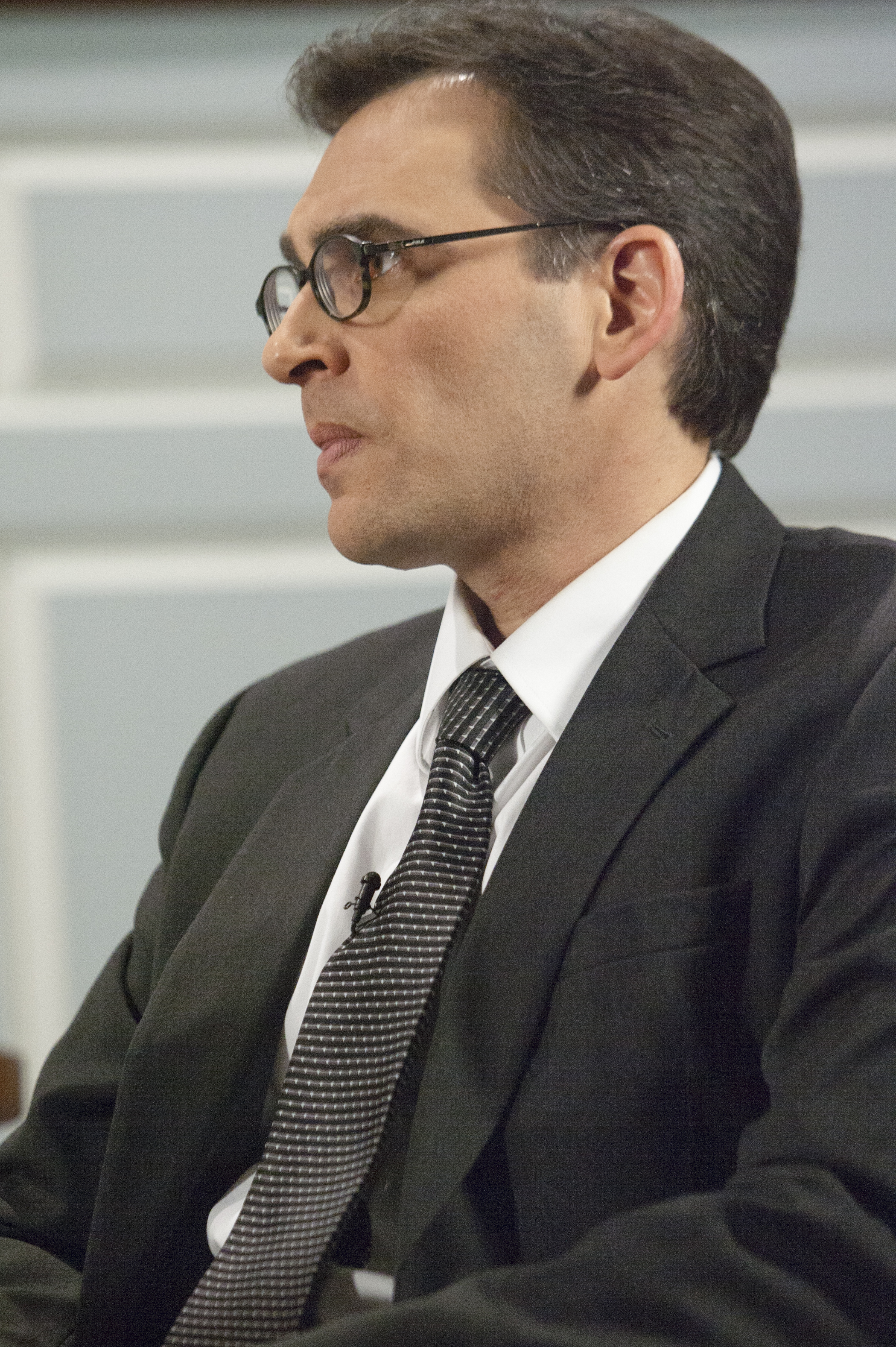 RS3J5269